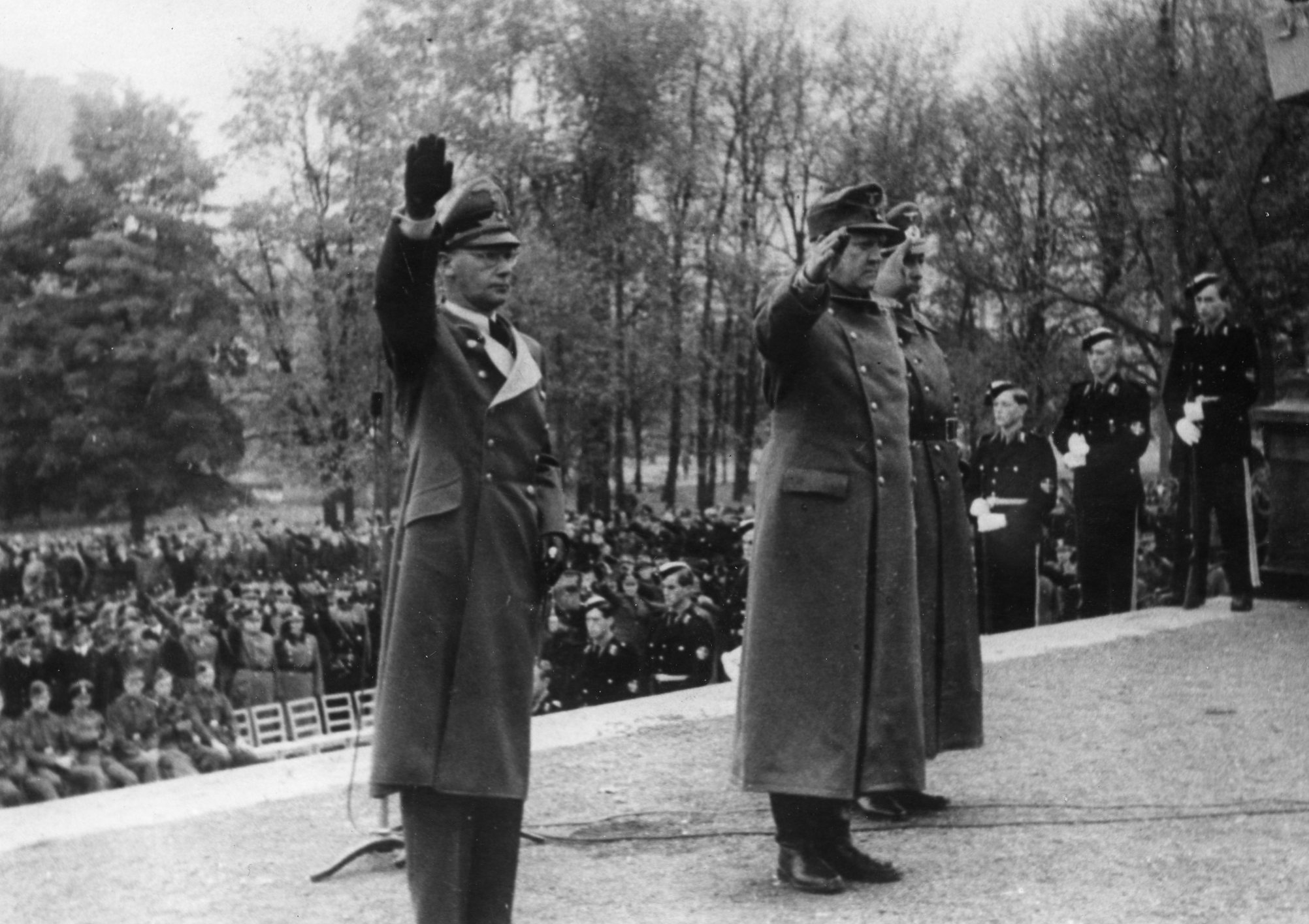 Førergarden i norske gardeuniformer i bakgrunnen. 1943/10/16. RA/PA- 1209/Ue 90/ img014 Nasjonal Samling, forkortet NS, var et norsk politisk parti som ble grunnlagt av Vidkun Quisling i 1933 og ble oppløst ved frigjøringa i 1945. Ideologisk fulgte partiet den tyske nasjonalsosialismen, og NS ble støtteorganisasjon for den tyske okkupasjonsmakta i Norge under andre verdenskrig.